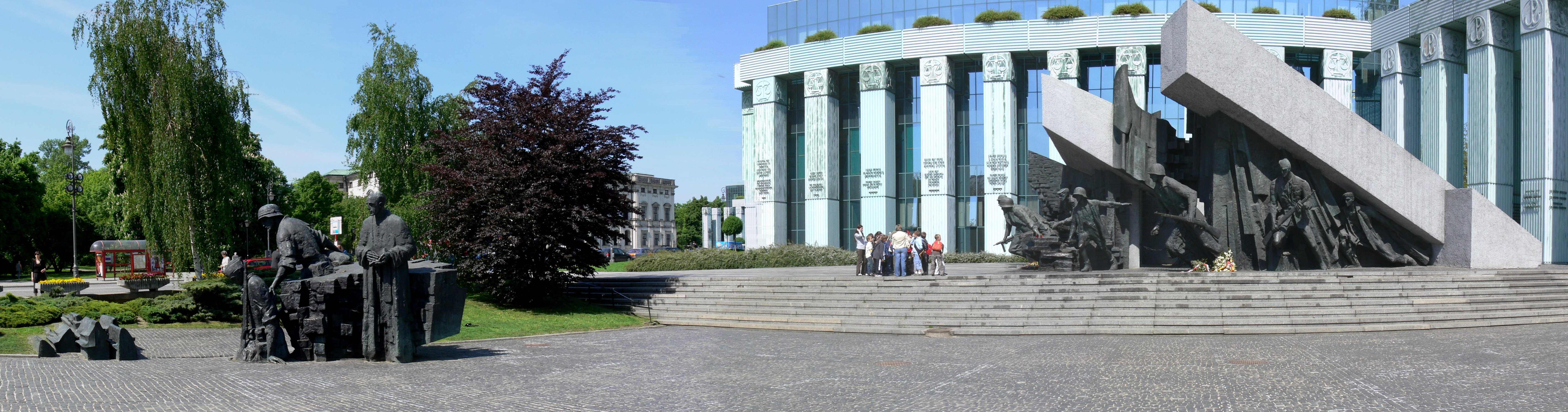 Warsaw Uprising Monument - panorama